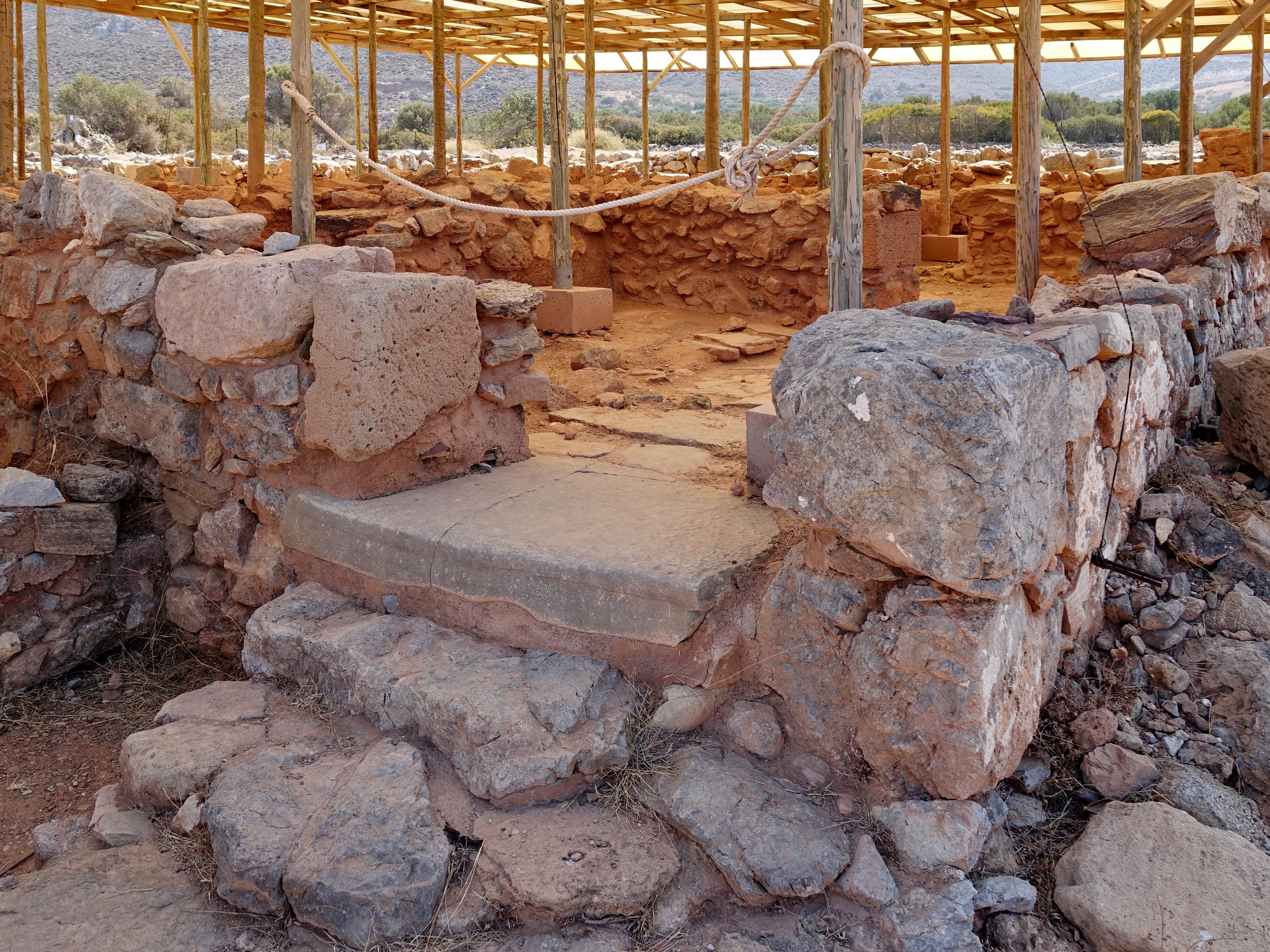 Ausgrabungsstätte von Roussolakkos (Ρουσσόλακκος) nahe Palekasto, Gemeinde Sitia, Kreta, Griechenland